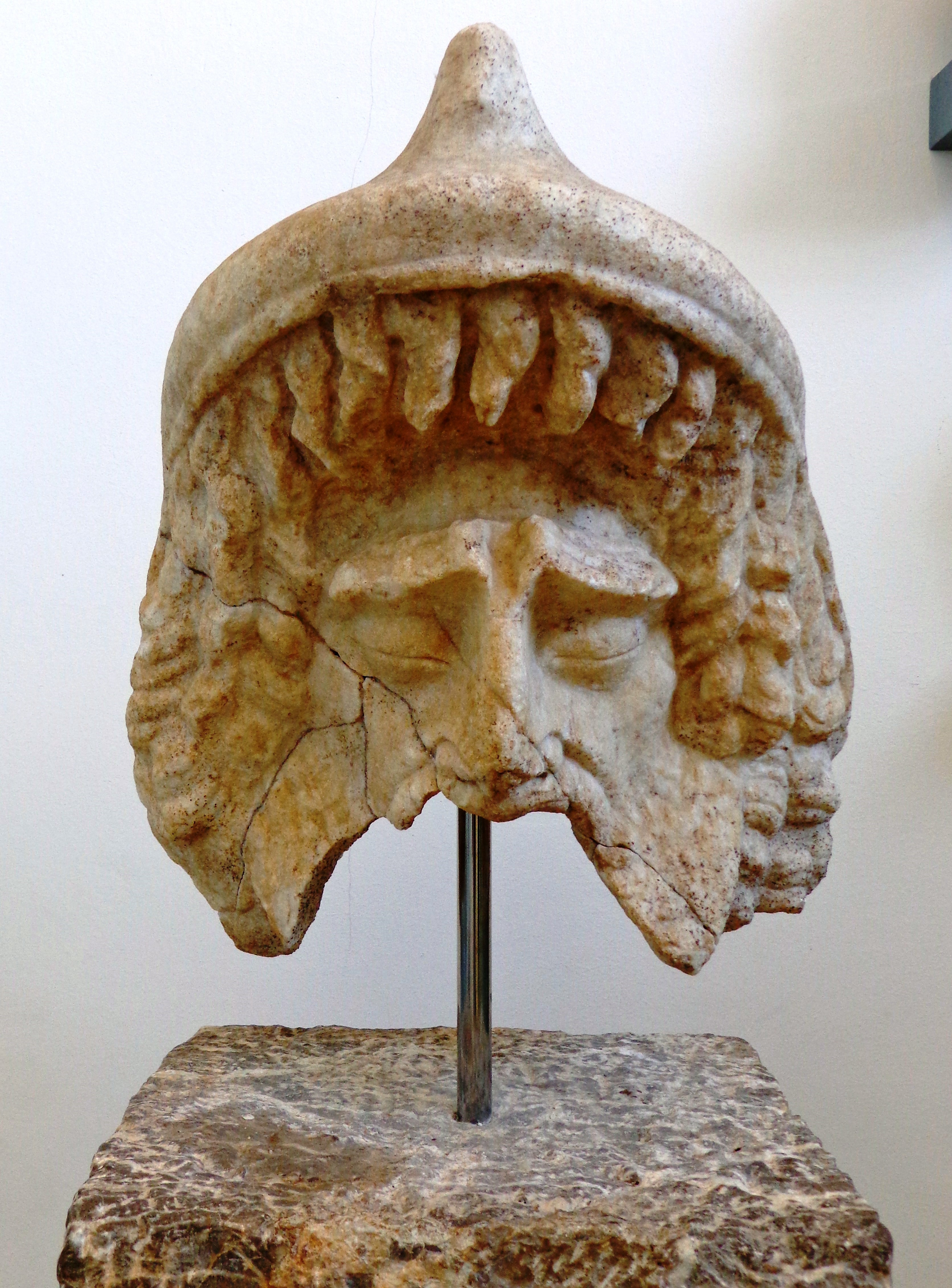 Museo - maschera da commedia. 08 settembre 2012 (Escursione Tindari, Santuario e area archeologica). Scatto fotografico altresì presente negli album caricati sui profili personali di Facebook, Panoramio, Google, etc.